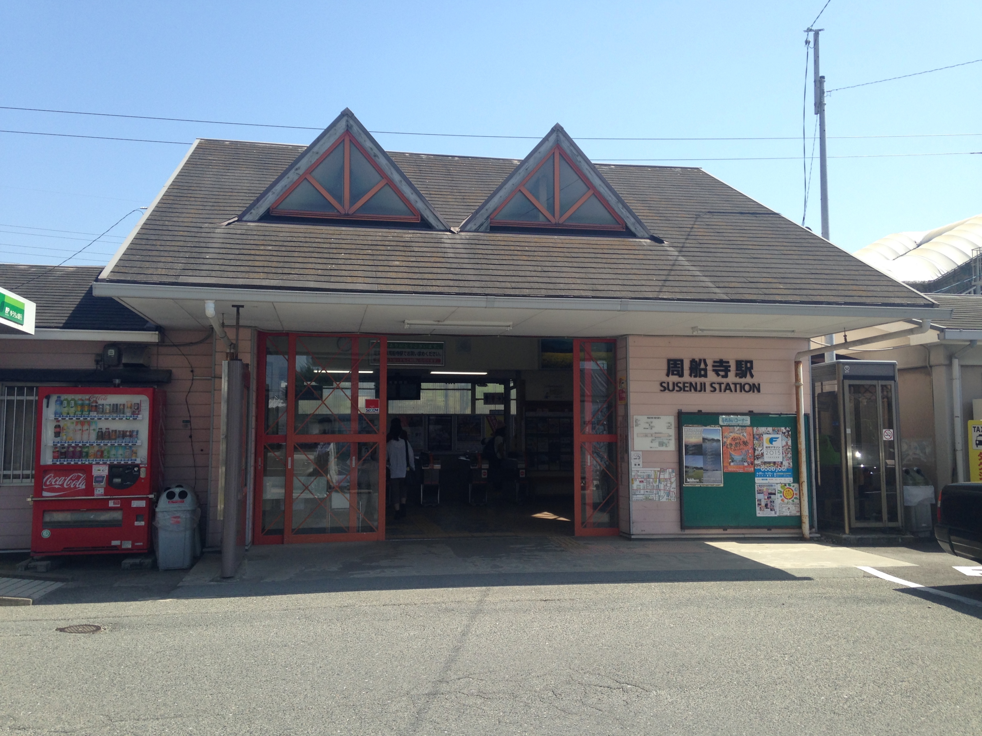 周船寺駅駅舎